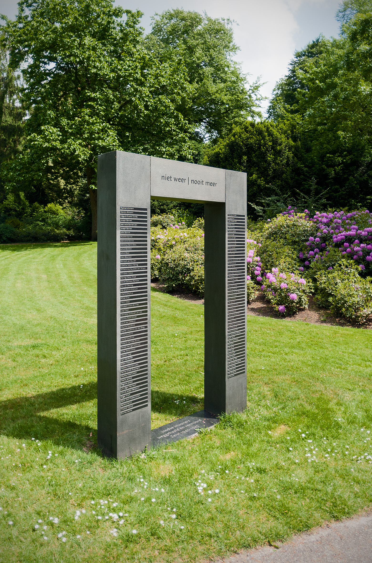 Zeist, monument voor de weggevoerde en vermoorde joodse inwoners, 1940-1945